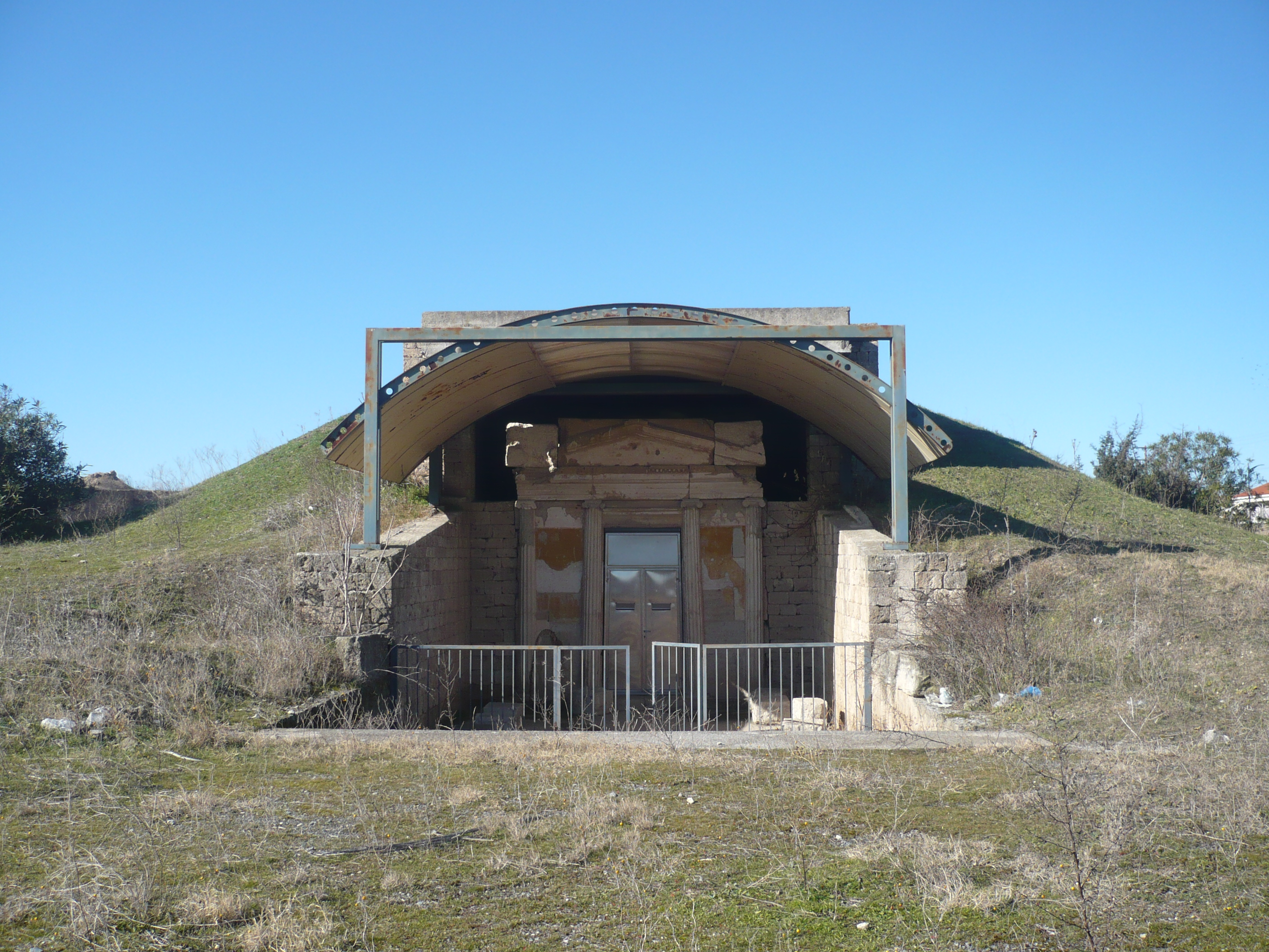 Μακεδονικός τάφος